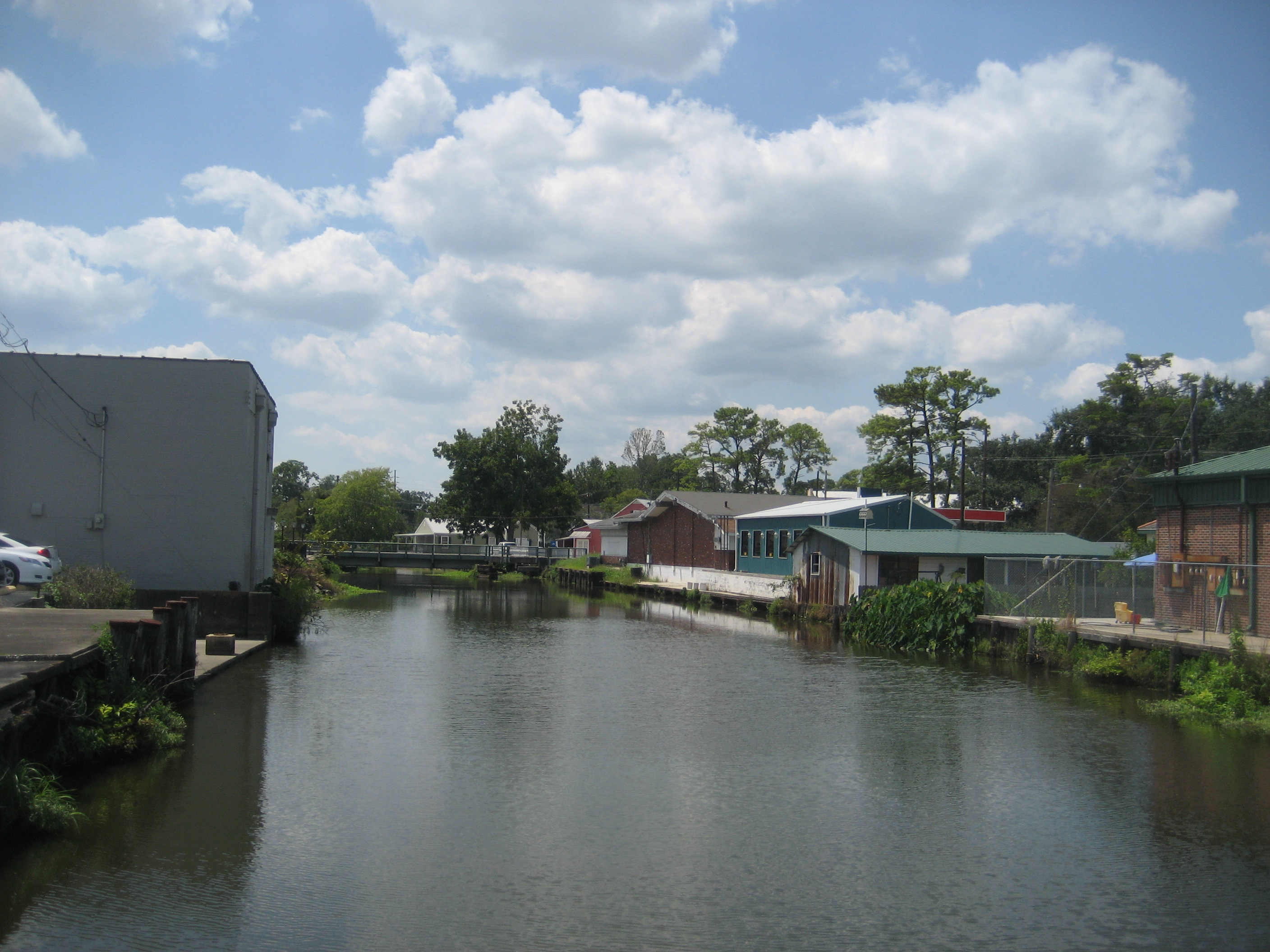 Houma, Louisiana, USA.